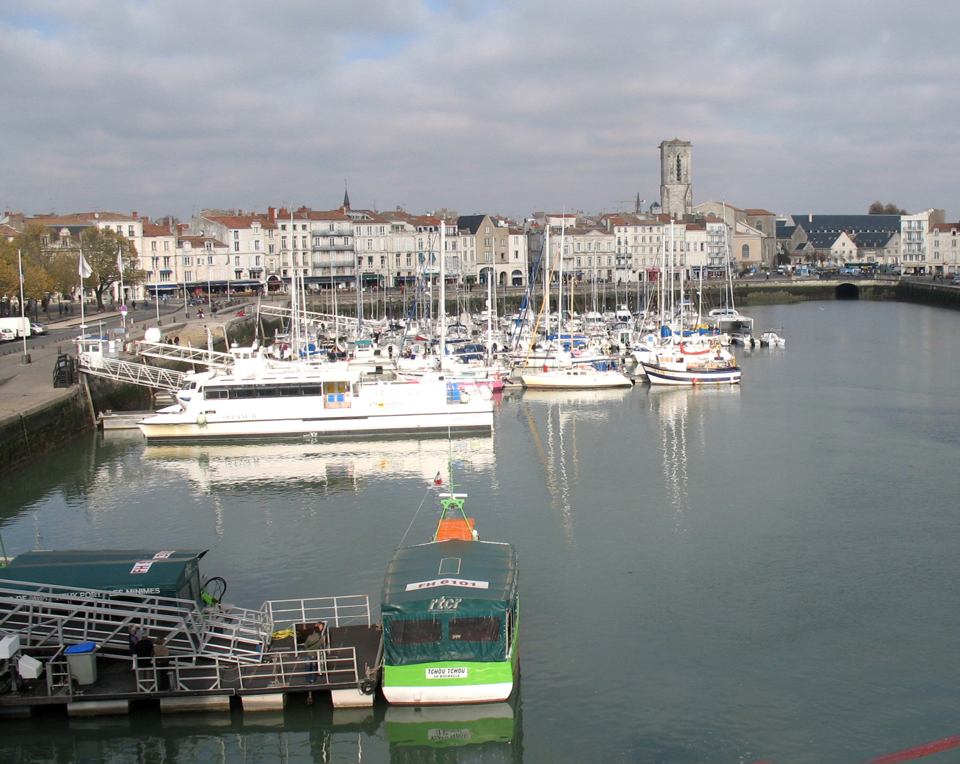 La Rochelle, le Vieux-Port, France